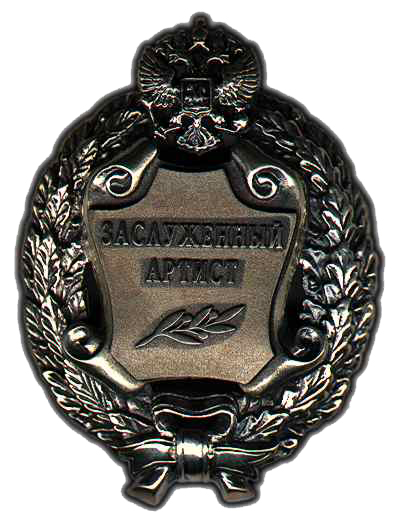 Заслуженный артист Российской Федерации. Нагрудный знак.